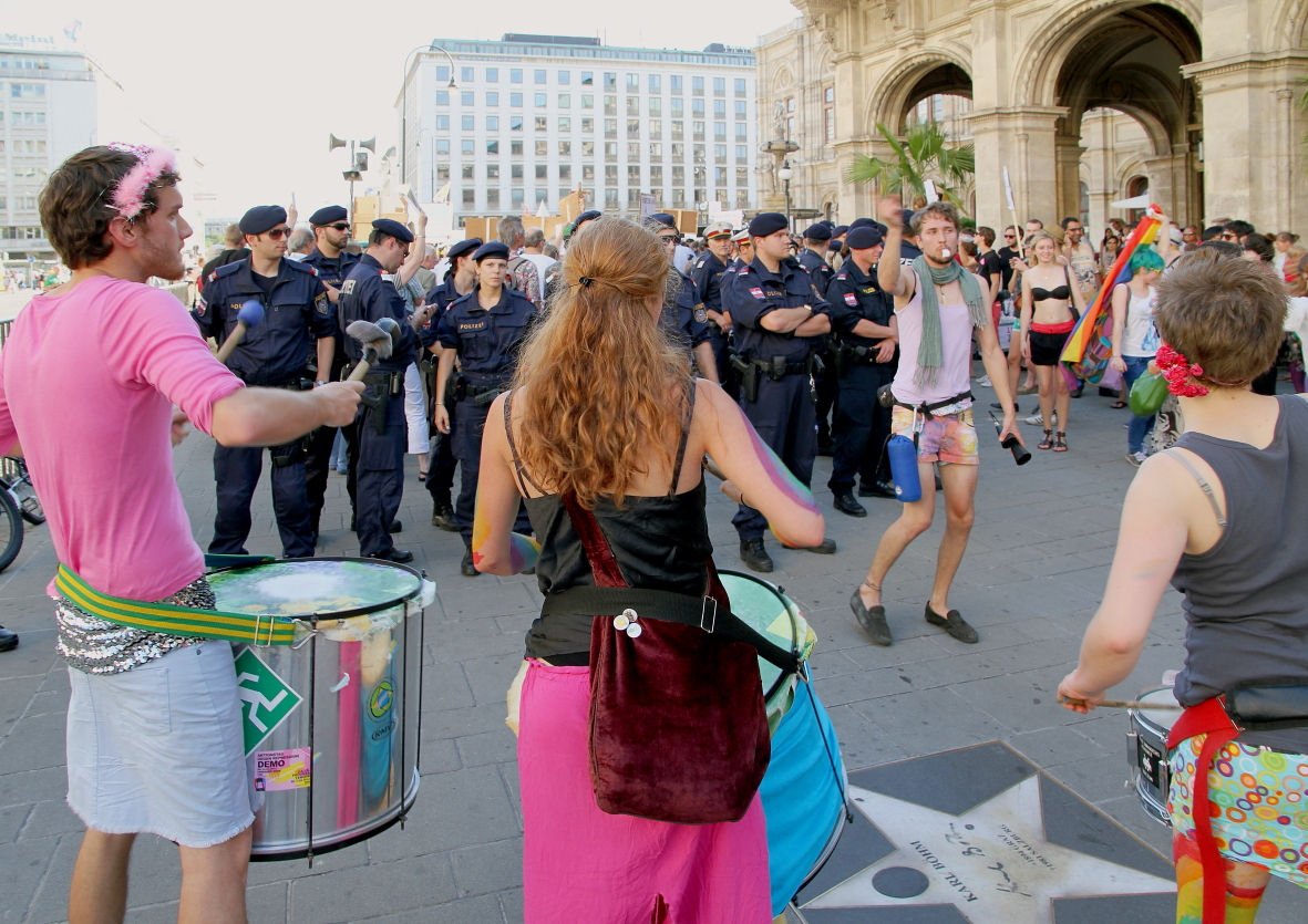 Die Rosa Antifa Wien versucht eine kleine konservativ-christliche Gegendemonstration (im Bildhintergrund und von vielen Polizisten abgeschirmt) bezüglich der Regenbogenparade 2012 bei der Wiener Staatsoper mittels Trommeln und Pfeifen akustisch zu übertönen.